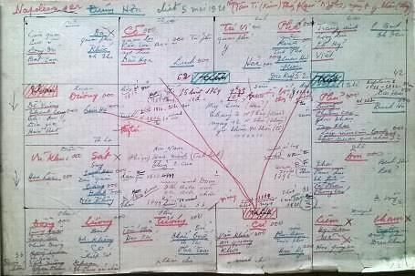 Napoléon 1b